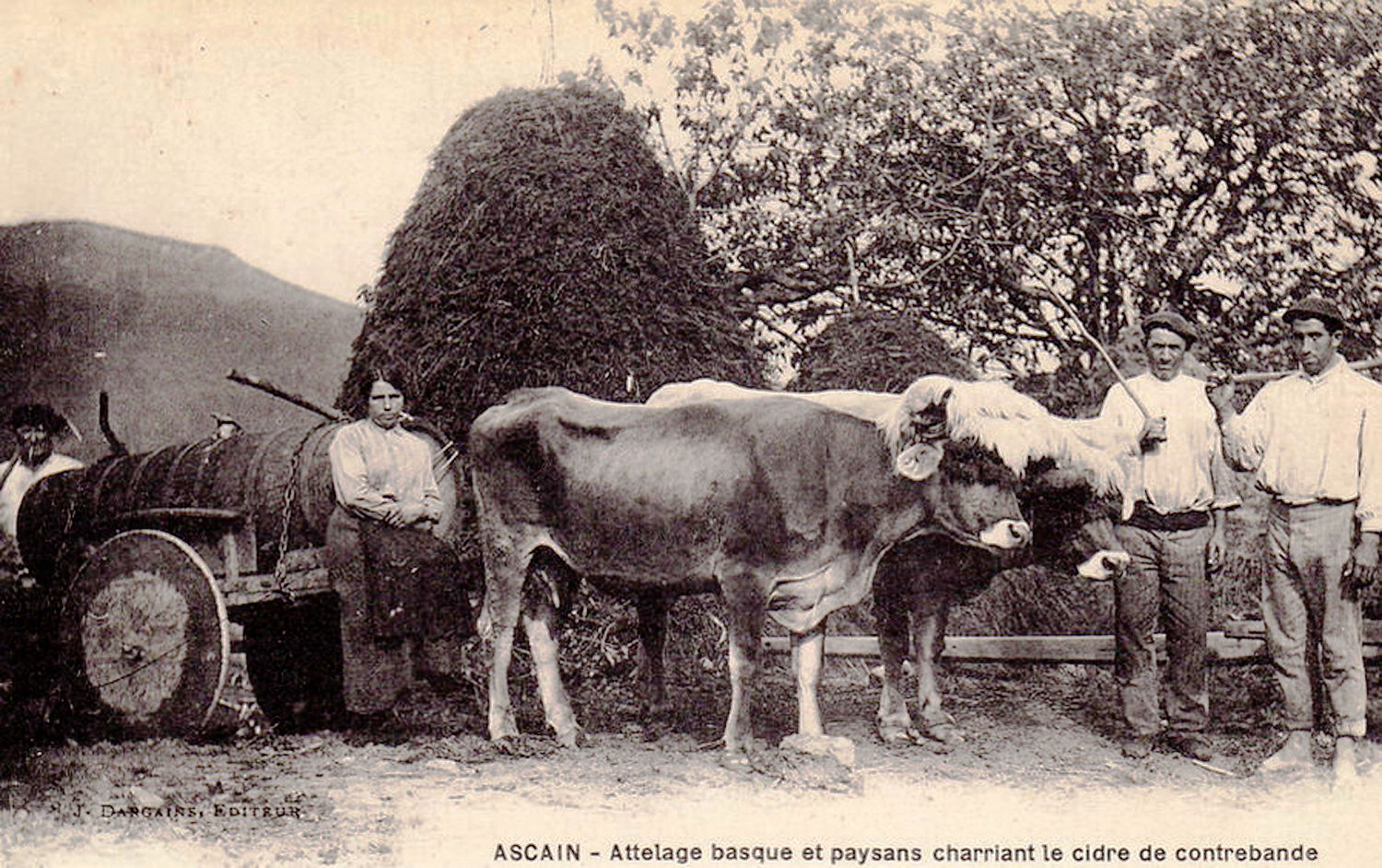 Cidre de contrebande